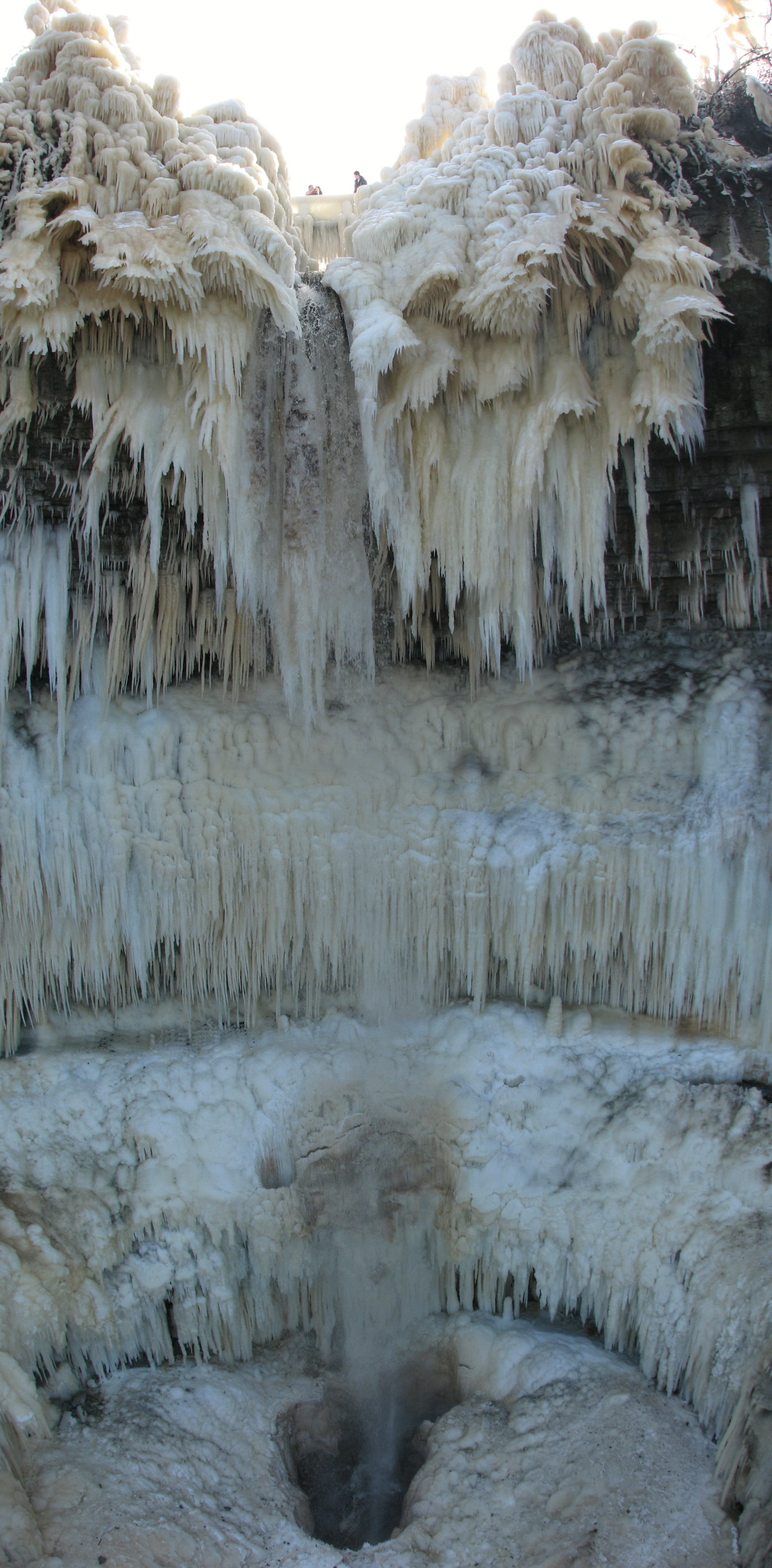 Valaste falls, Ontika, Estonia. 2008